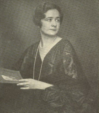 Private Aufnahme von Marie-Luise von Cavallar bei einer Rezitation in Radio Wien im Frühjahr 1931.